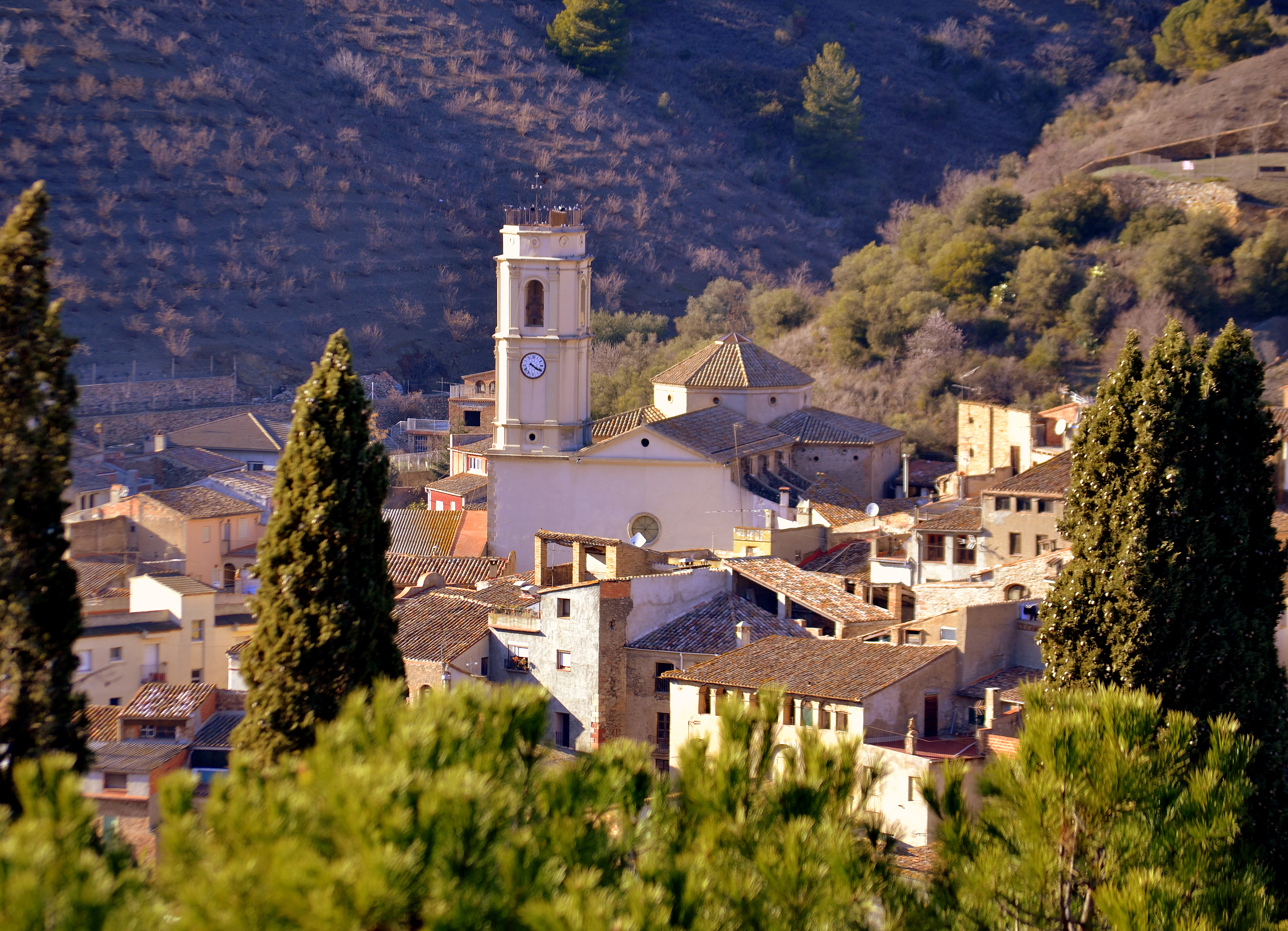 Església de Sant Joan Evangelista (Porrera)